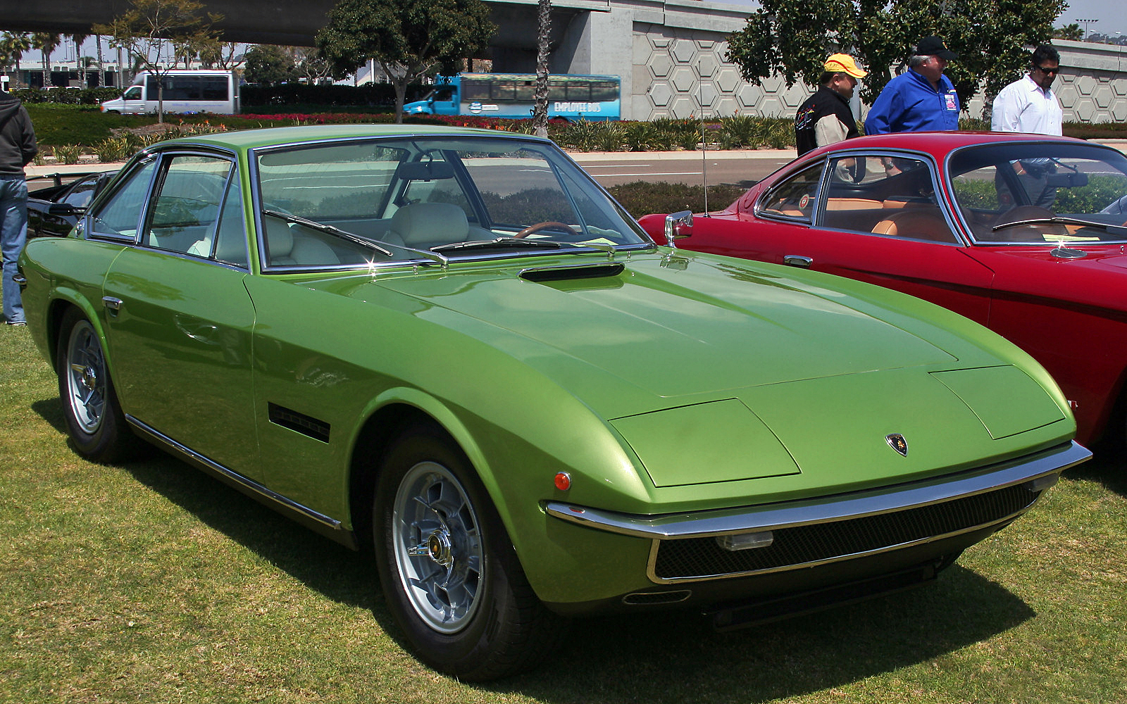 Spanish Landing Park Bella Italian 2008 Lamborghini Islero